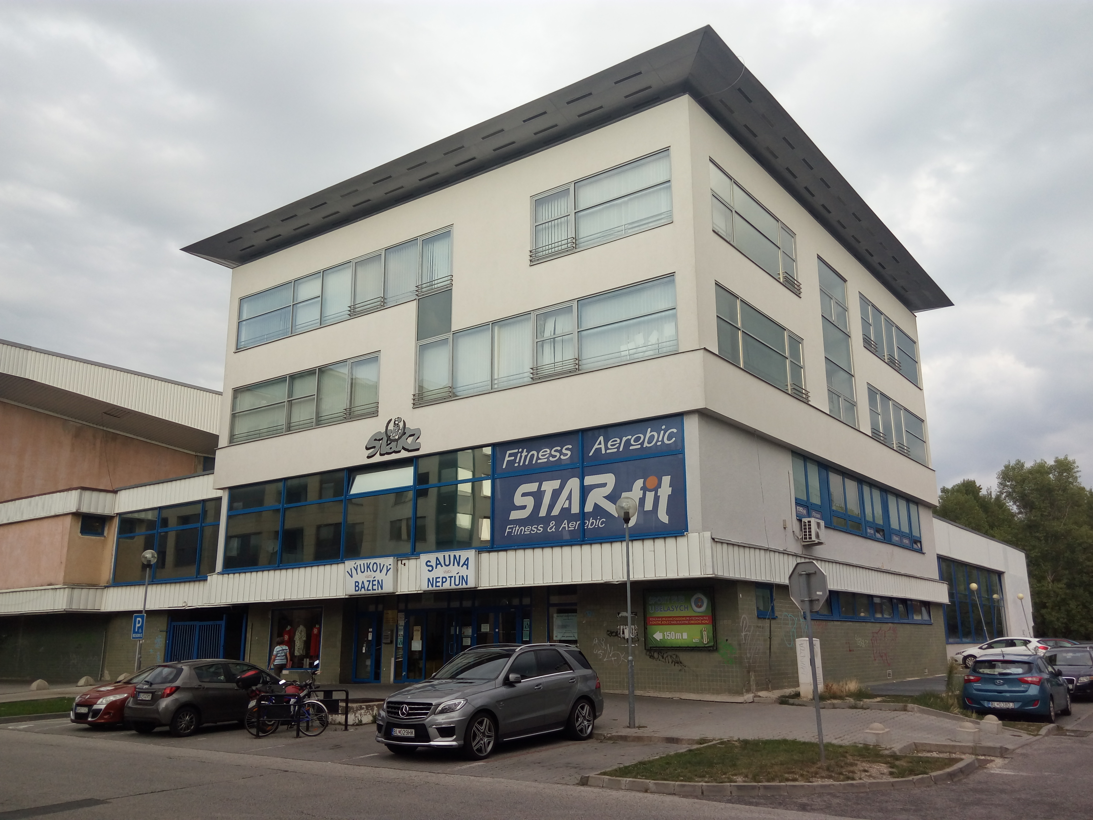 Junácka 6, Nové Mesto, Bratislava